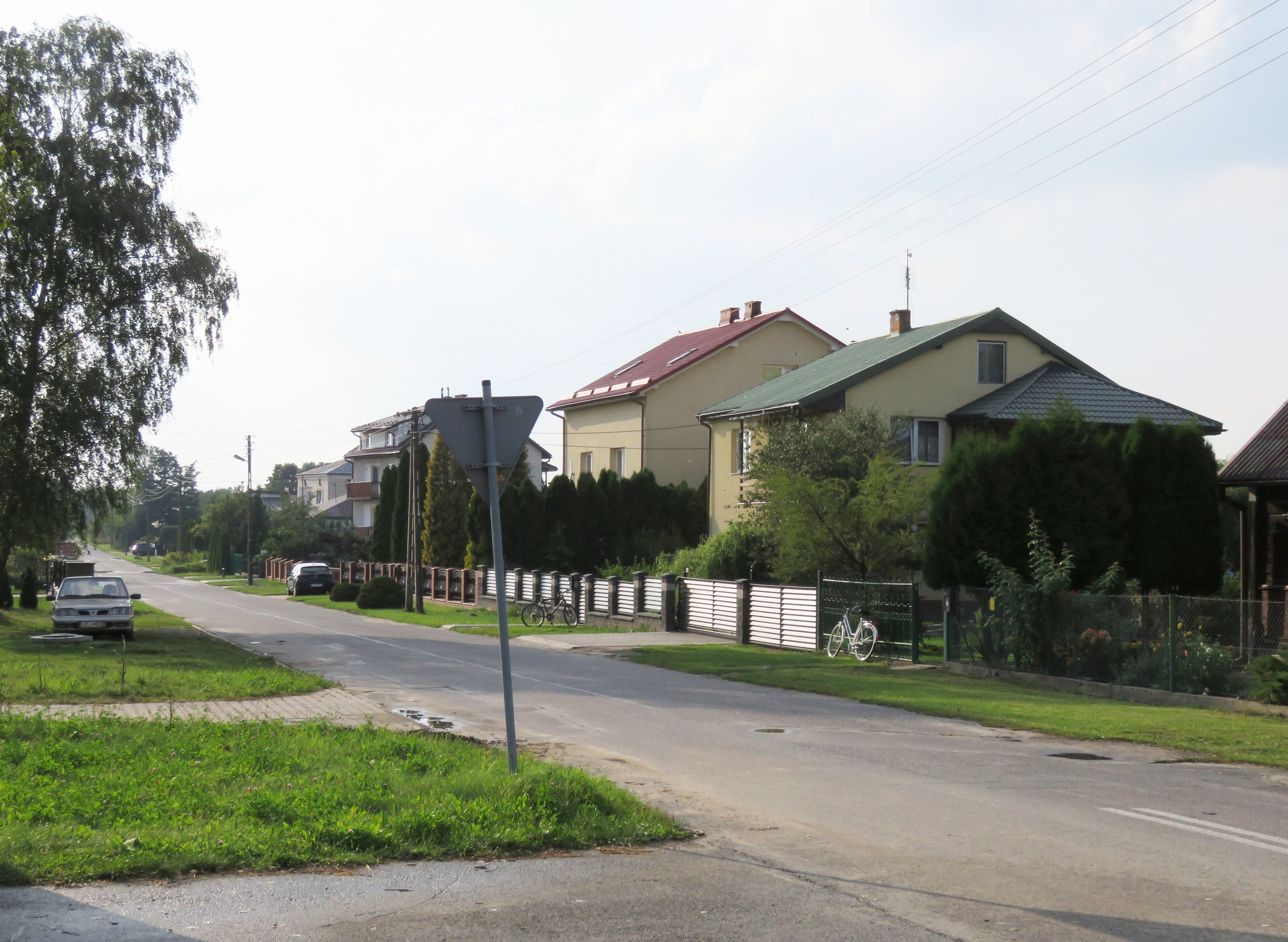 Wronów